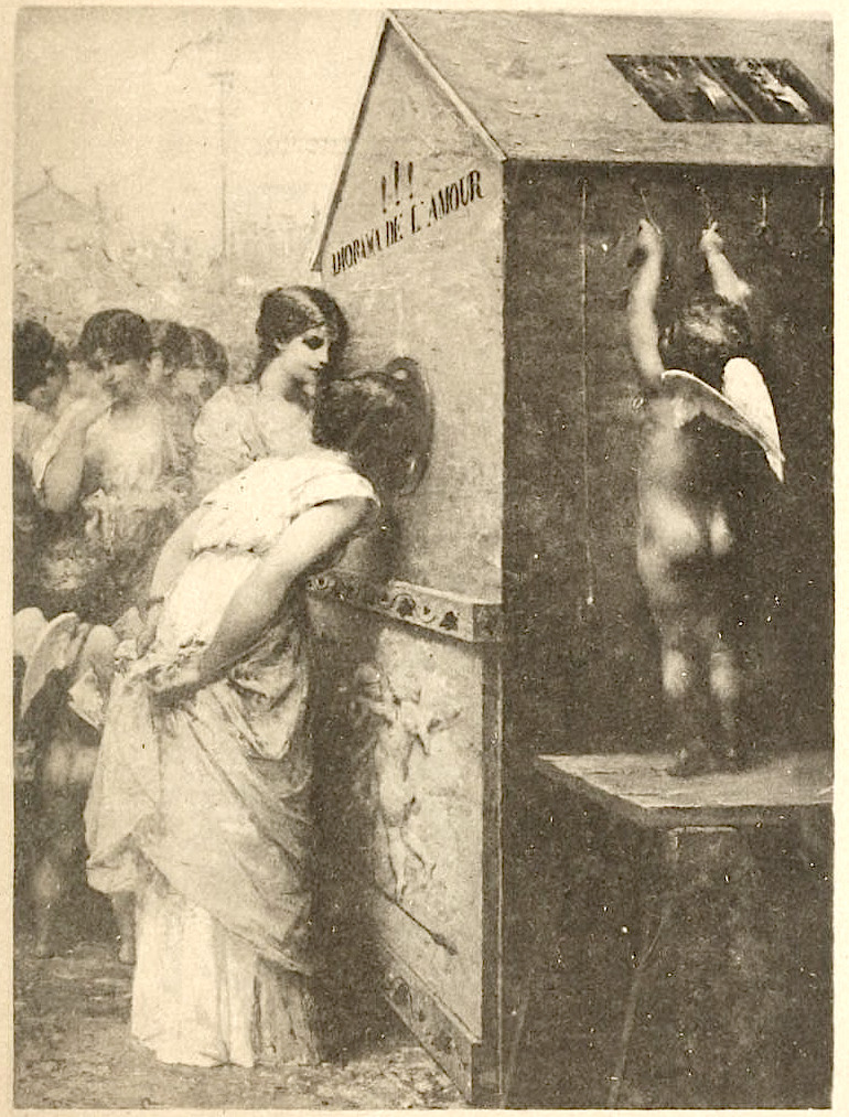 Phototypic print of Diorama de l'Amour by Jean Aubert, Salon de 1887.